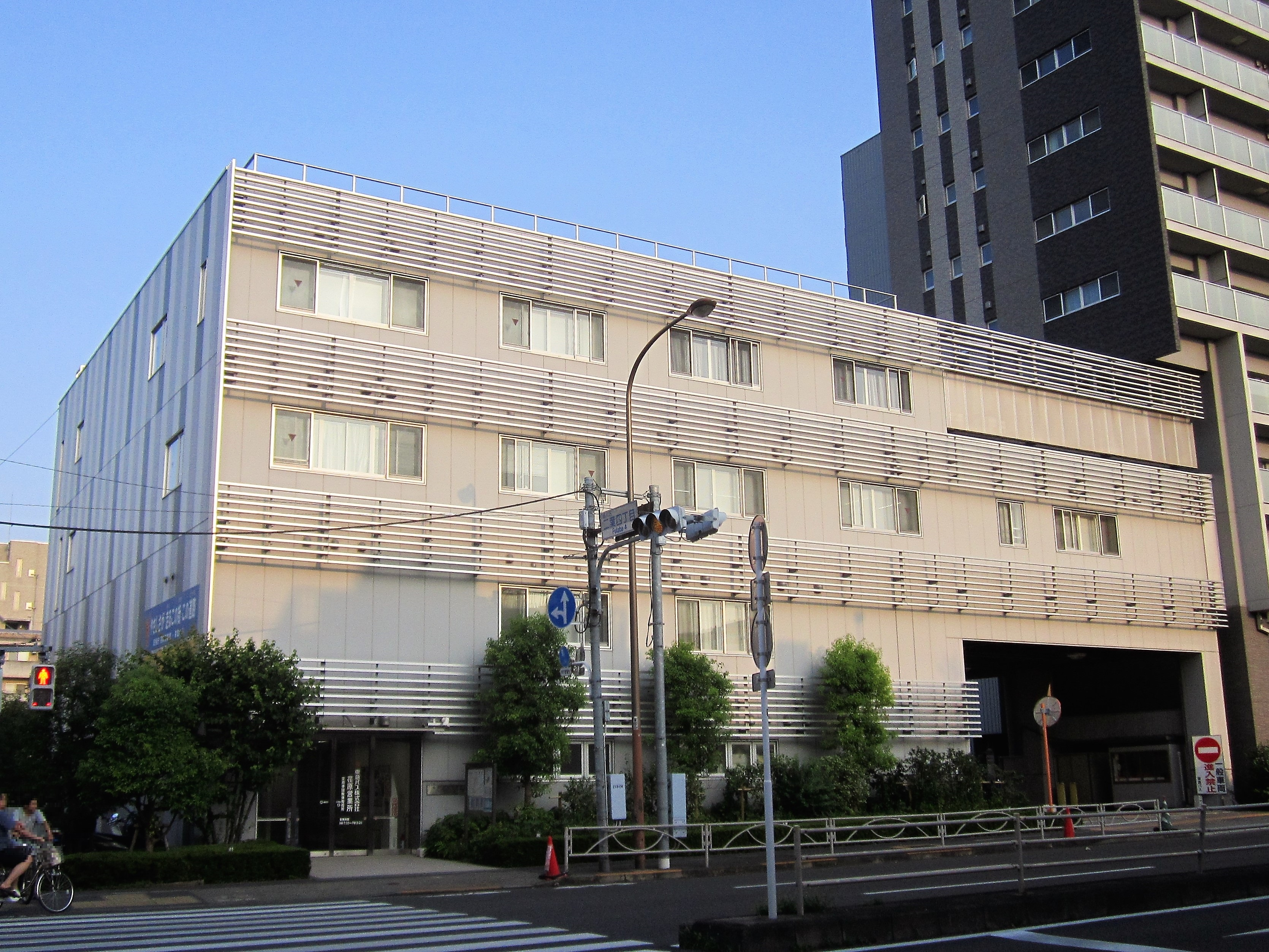 東急バス荏原営業所